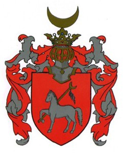 Araż, herb szlachecki